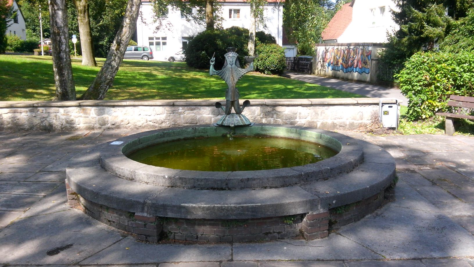 Wassermannbrunnen in denkmalgeschützten Wohnsiedlung Wellensiek in Bielefeld.